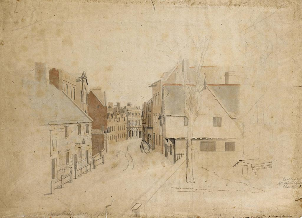 Full Street Derby: Eine Zeichnung (Feder mit Tinte) von Peter Perez Burdett aus dem Jahre 1769. In dem schmalen Haus (drittes von links) auf der linken Straßenseite hat Burdett ab 1765 einige Zeit lang gewohnt. Von dem Architekten Joseph Pickford (1734–1782), ein Freund von Burdett, ist das Gebäude im gotischen Stil gestaltet worden.